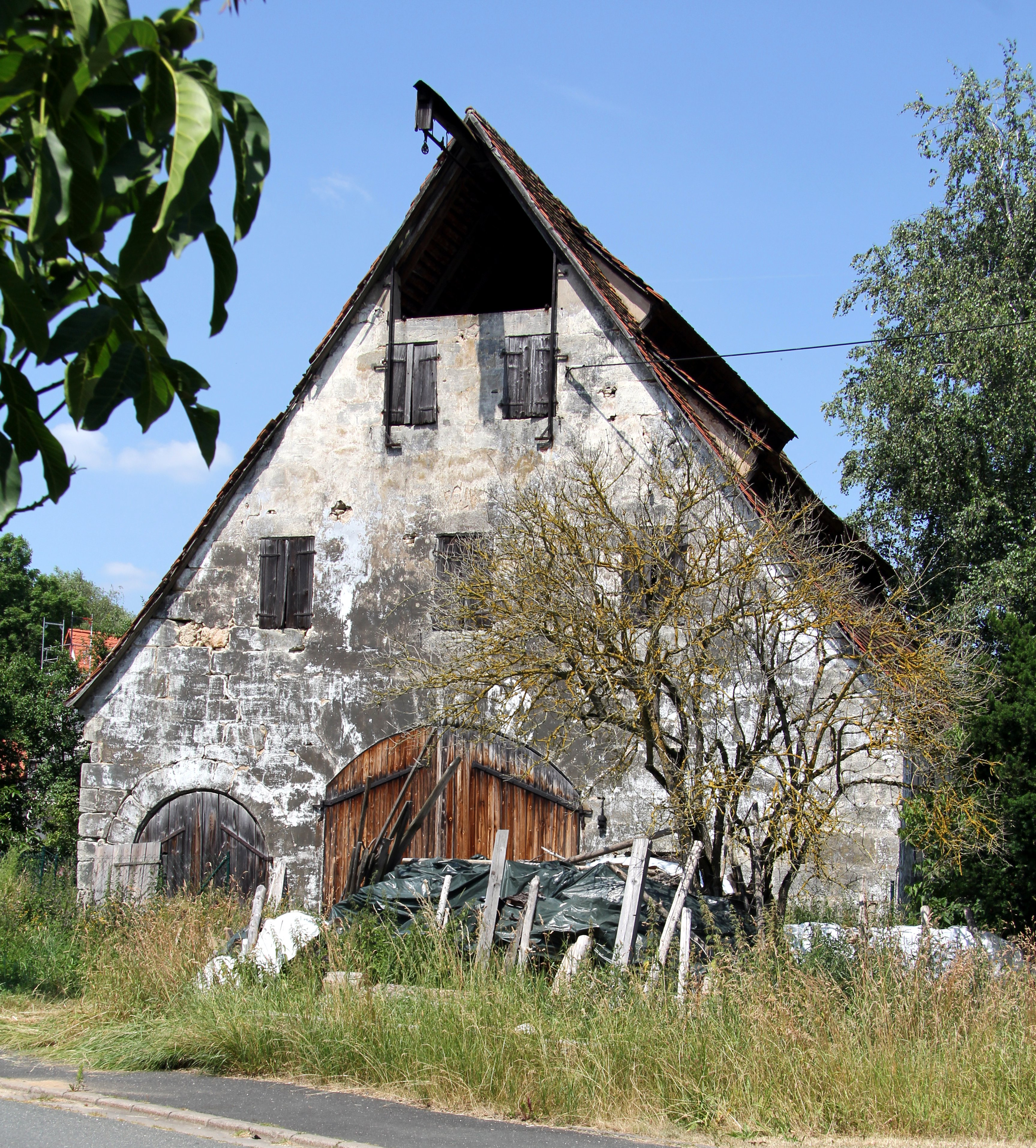 Hopfenscheune zu Haus 10 in Benzendorf, Mittelfranken - FrontseiteThis is a photograph of an architectural monument.